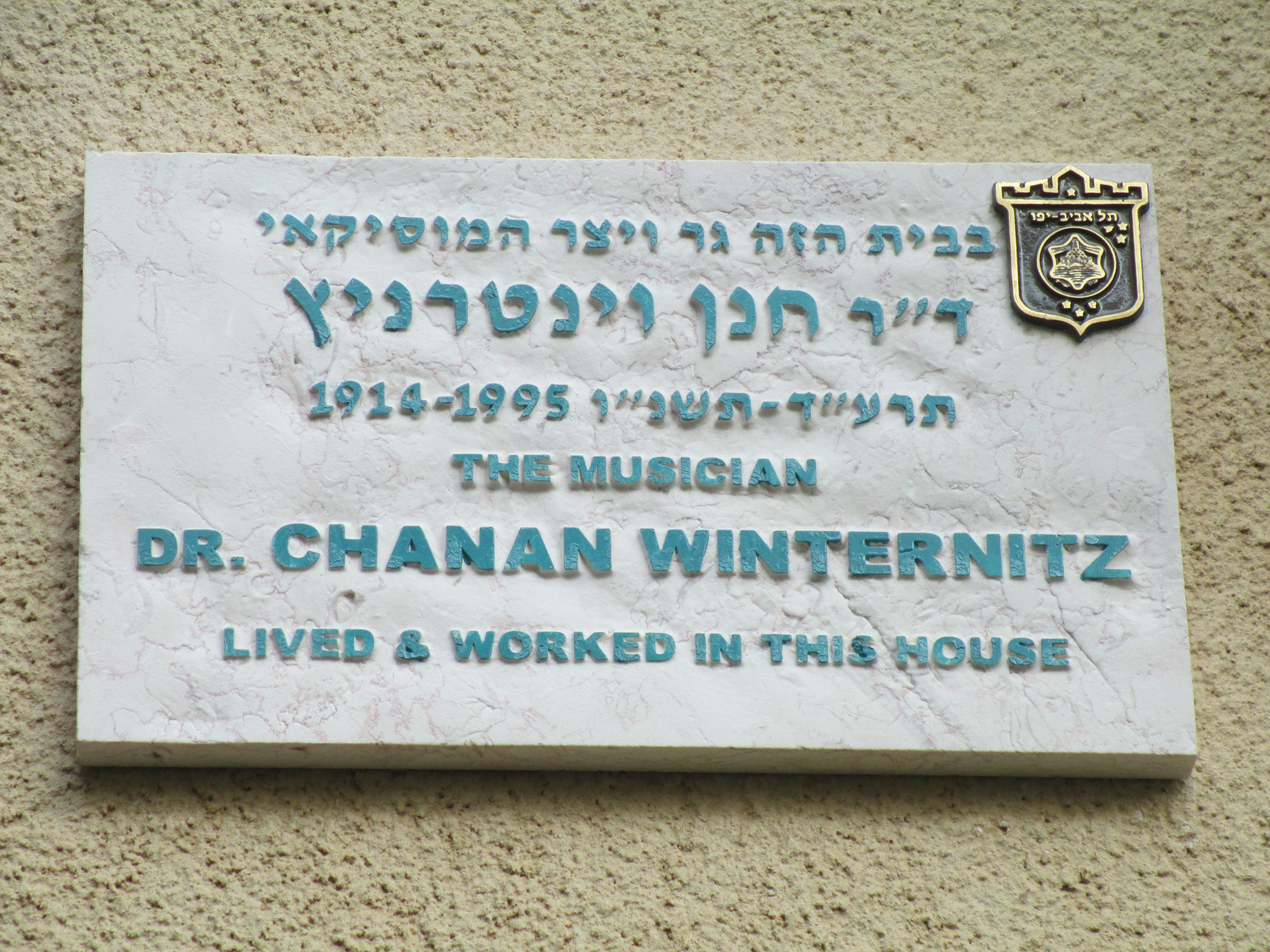 לוחית זיכרון לד"ר חנן וינטרניץ על ביתו ברחוב ויזל 17 בתל אביב